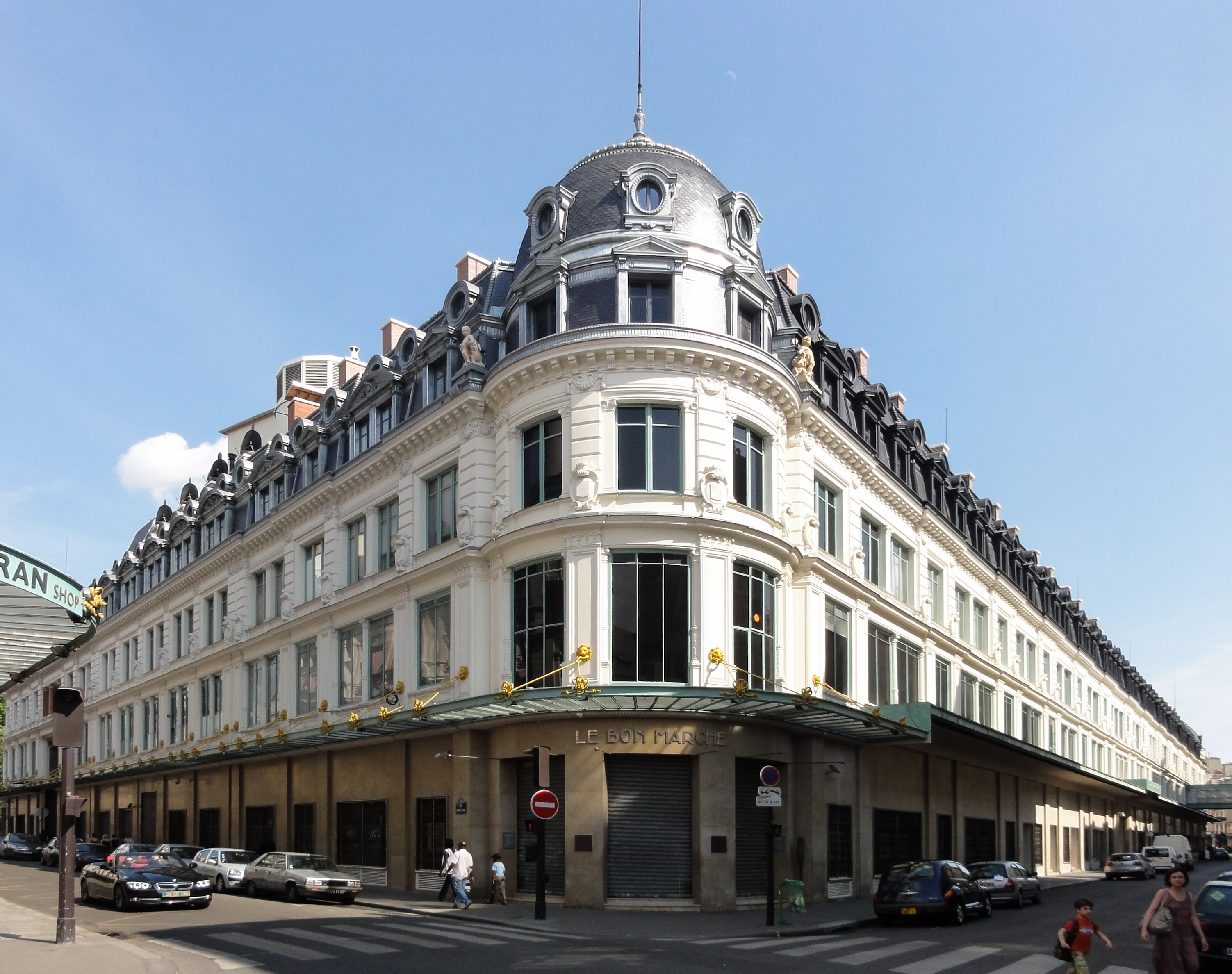 Exterior of Le Bon Marché, Paris, France